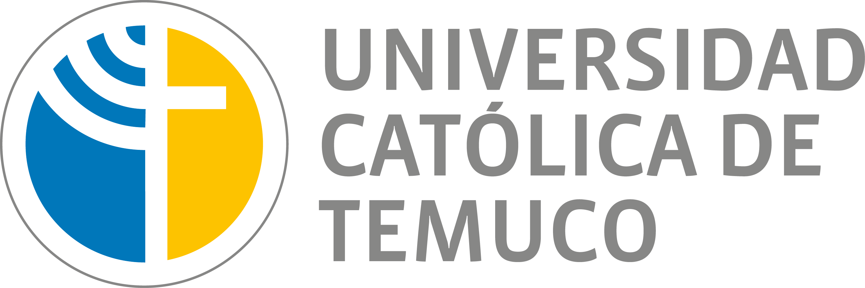 Logro de la Universidad Catolica de Temuco Logo Vertical